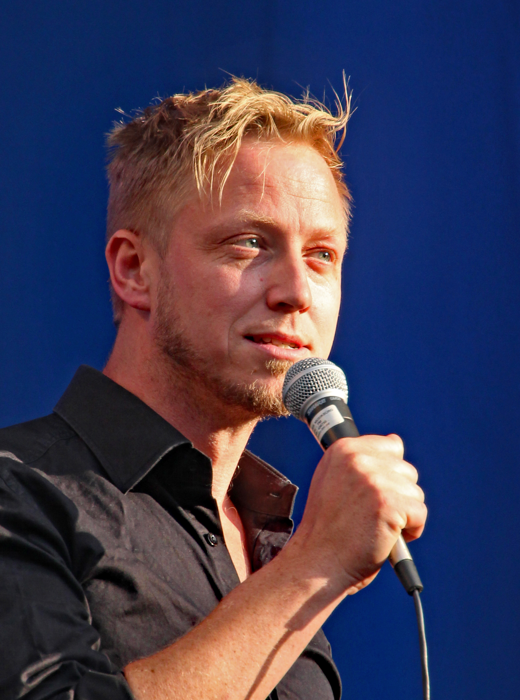 Bildinhalt: Martin Tingvall, schwedischer Jazzpianist und -komponist, bei einem Auftritt im Frankfurter Palmengarten Aufnahmeort: Frankfurt am Main, Deutschland Die dargestellte Person wurde bei einem öffentlichen Auftritt fotografiert.